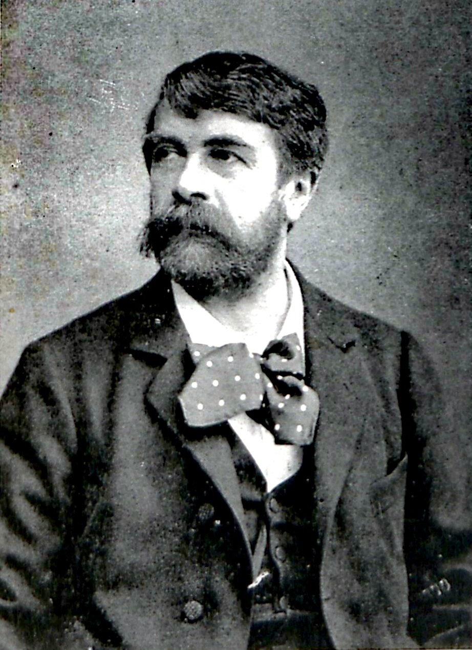 Geheimer Baurat Prof. Carl von Groszheim